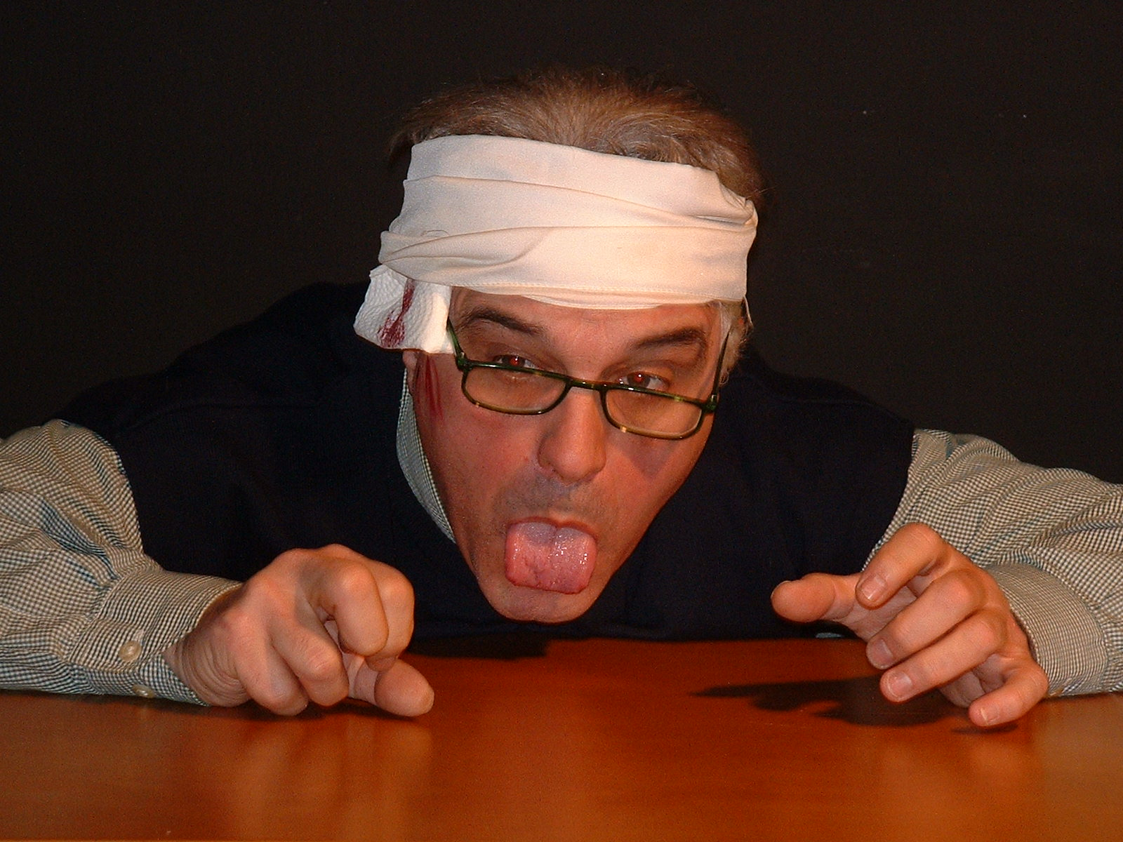 Heinz Koch, einer der beiden Leiter des AuGuSTheater Neu-Ulm, spielt in dem Stück "Klamms Krieg", inszeniert von Claudia Riese, den Deutschlehrer Klamm Summary Bildbeschreibung: Heinz Koch als Lehrer Klamm in "Klamms Krieg" von Kai Hensel Quelle: AuGuSTheater Neu-Ulm Fotografin: Claudia Riese Datum: 29. März 2006 Sonstiges: mehr unter Das AuGuSTheater Neu-Ulm genehmigt die Veröffentlichung.